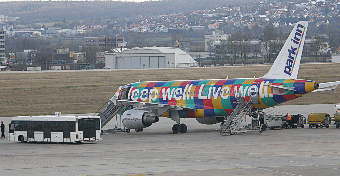 Eine buntes Flugzeug der Germanwings in Stuttgart (Germanwings Airbus A319 D-AKNF)